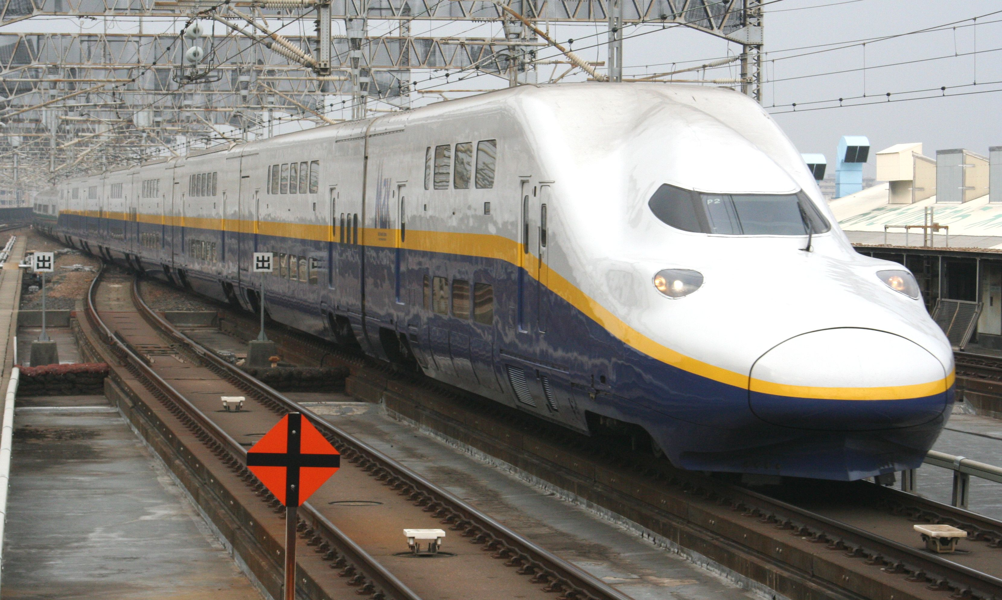 新幹線E4系電車